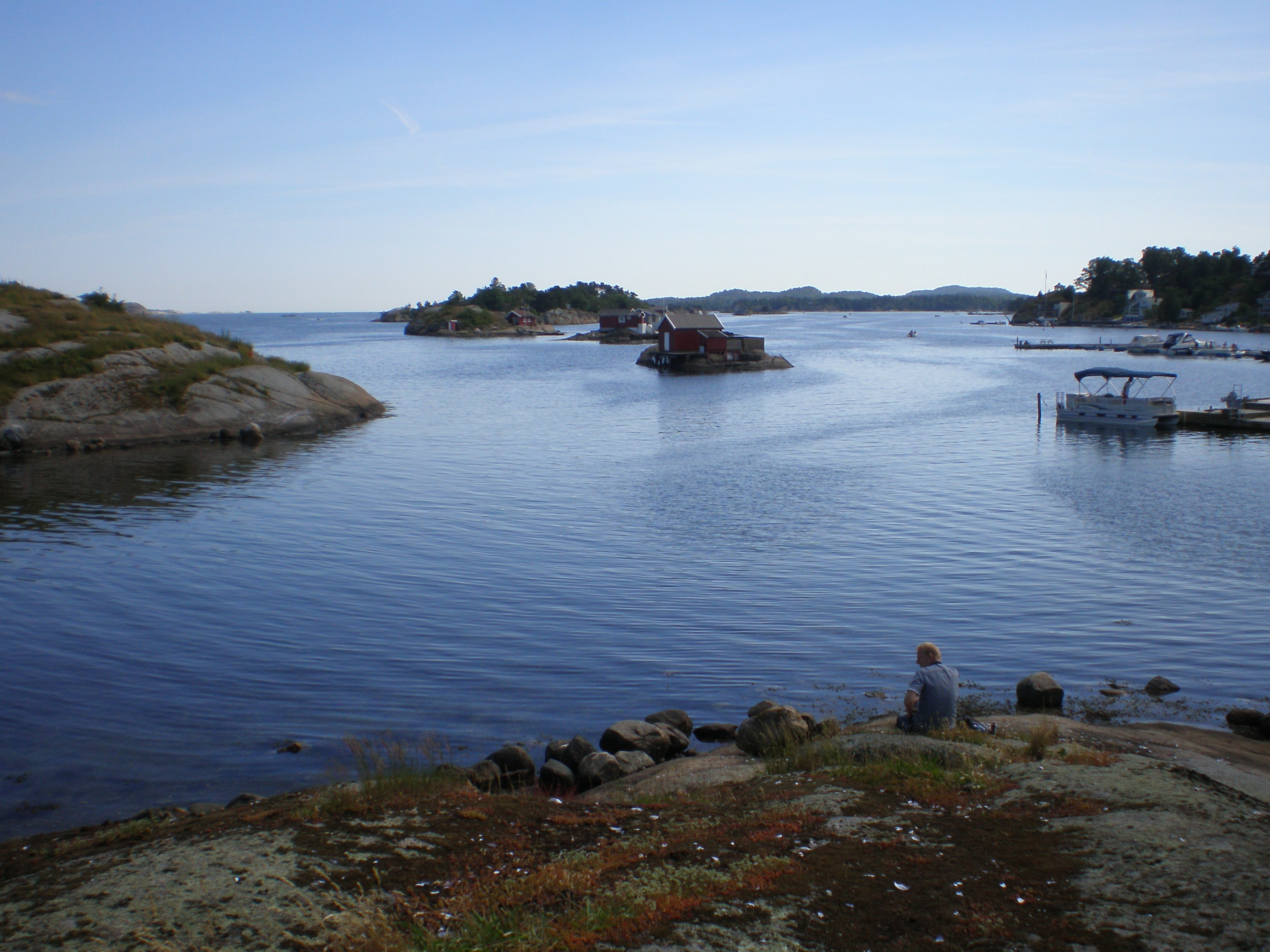 Sandefjord, Norwegia